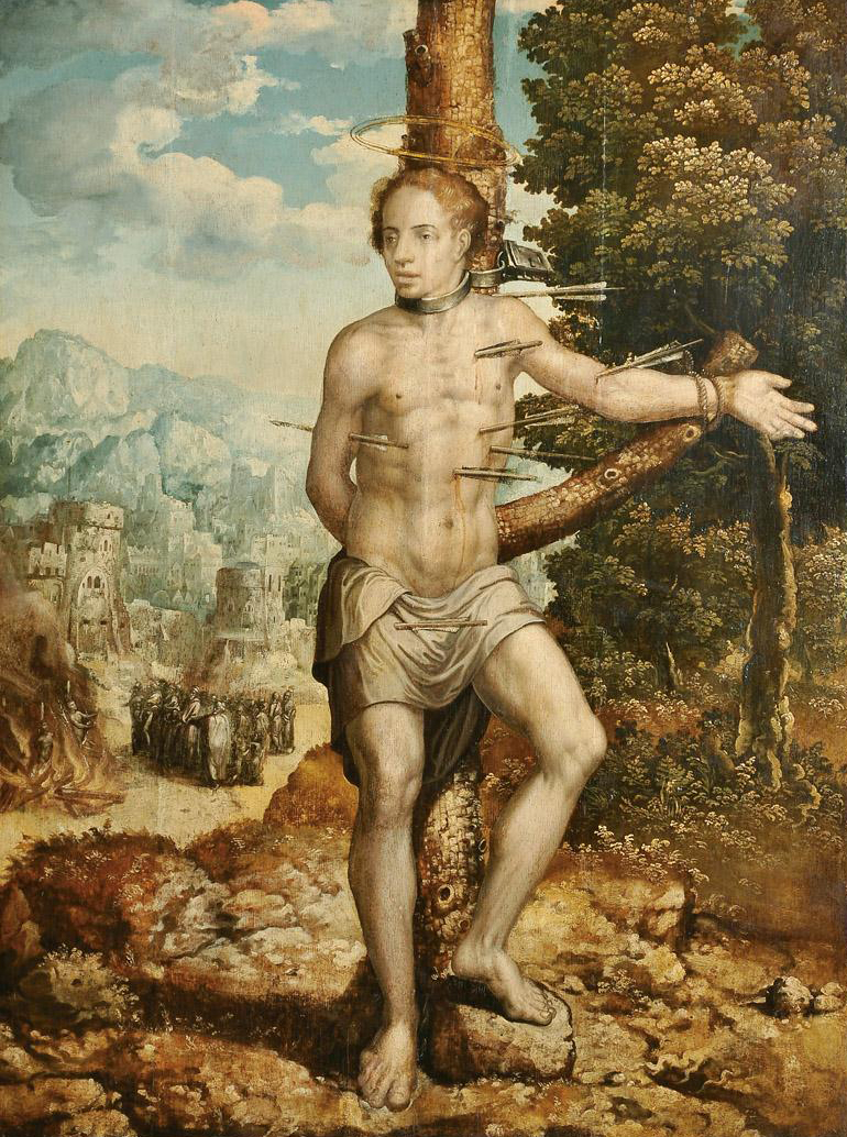 integrou a Colecção D. António de Sousa Coutinho, tendo figurado na exposição "Pintura dos Mestres do Sardoal e de Abrantes", Fundação Calouste Gulbenkian, Lisboa, 1971, encontrando-se identificado e reproduzido no respectivo catálogo, p. 66, nº 100. ◙Dev